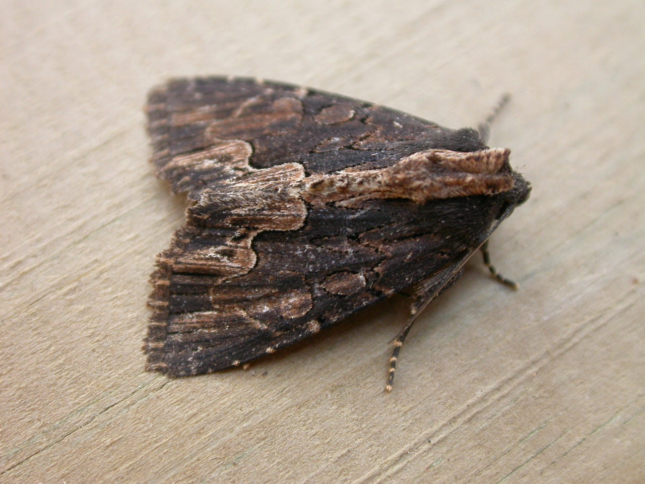 Dypterygia scabriuscula, Gastes, Landes, SW France, 6/7 July 2003